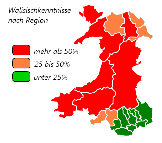 Walisisch in Prozent